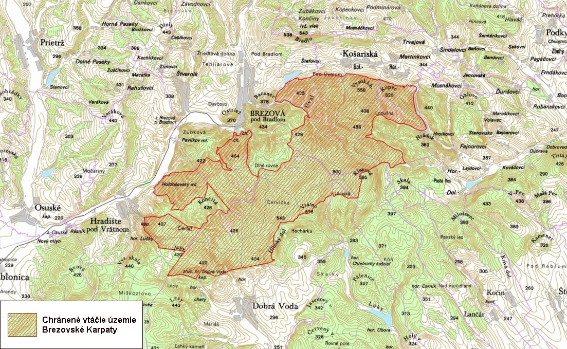 Chránené vtáčie územie Brezovské Karpaty